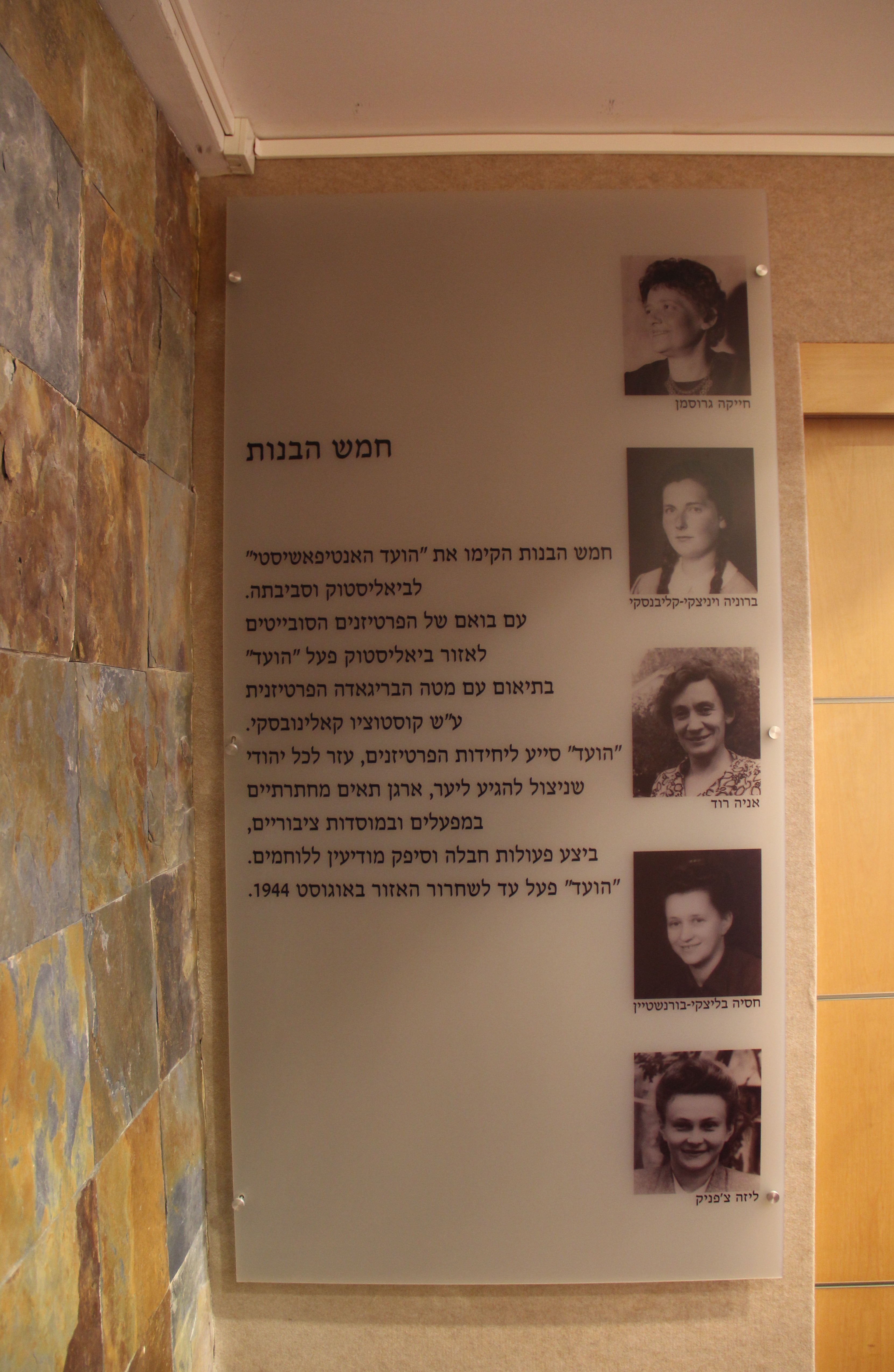 קיר זיכרון לבנות הועד האנטי פאשיסטי